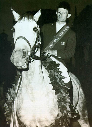 Graziano Mancinelli e Rockette Vincitori dei Campionati Europei di Roma 1963